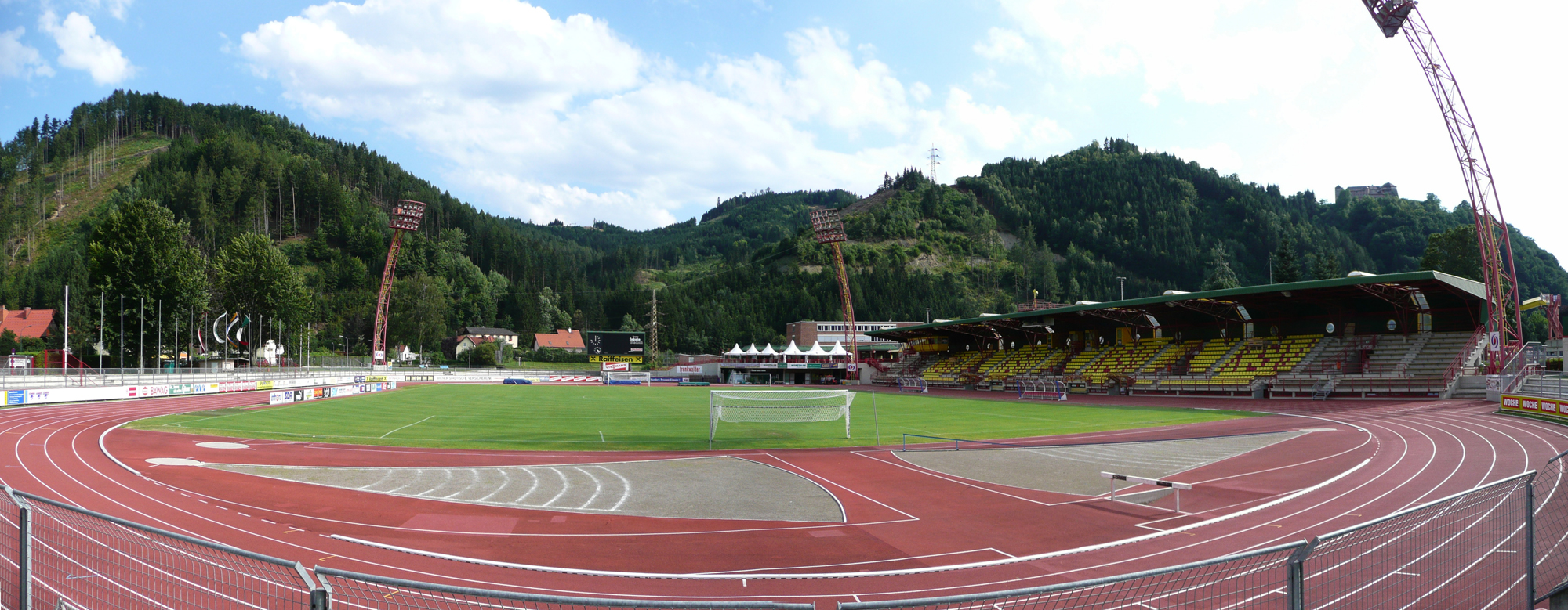 Panoramabild des Franz-Fekete-Stadion in Kapfenberg